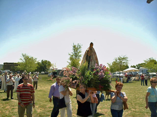 Procesión de San Gregorio.